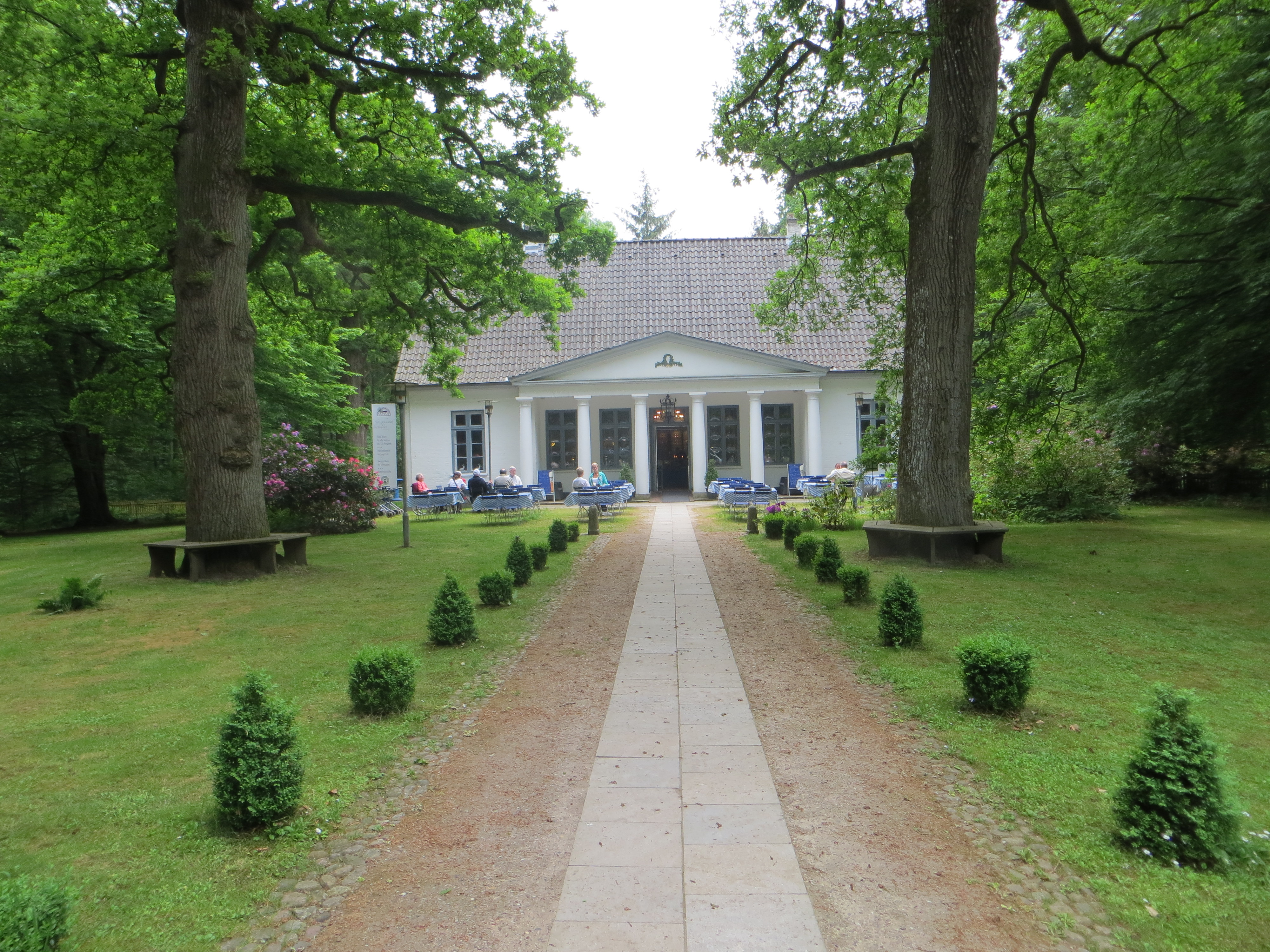 Ehemaliges Café in der Marienhölzung (Sommer 2013)